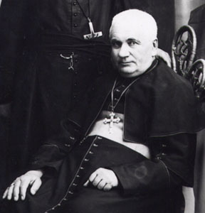 Vital-Justin Grandin, évêque catholique de St. Albert